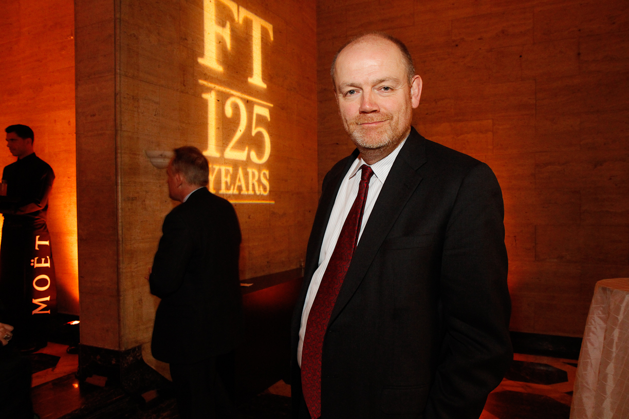 © Grace Villamil